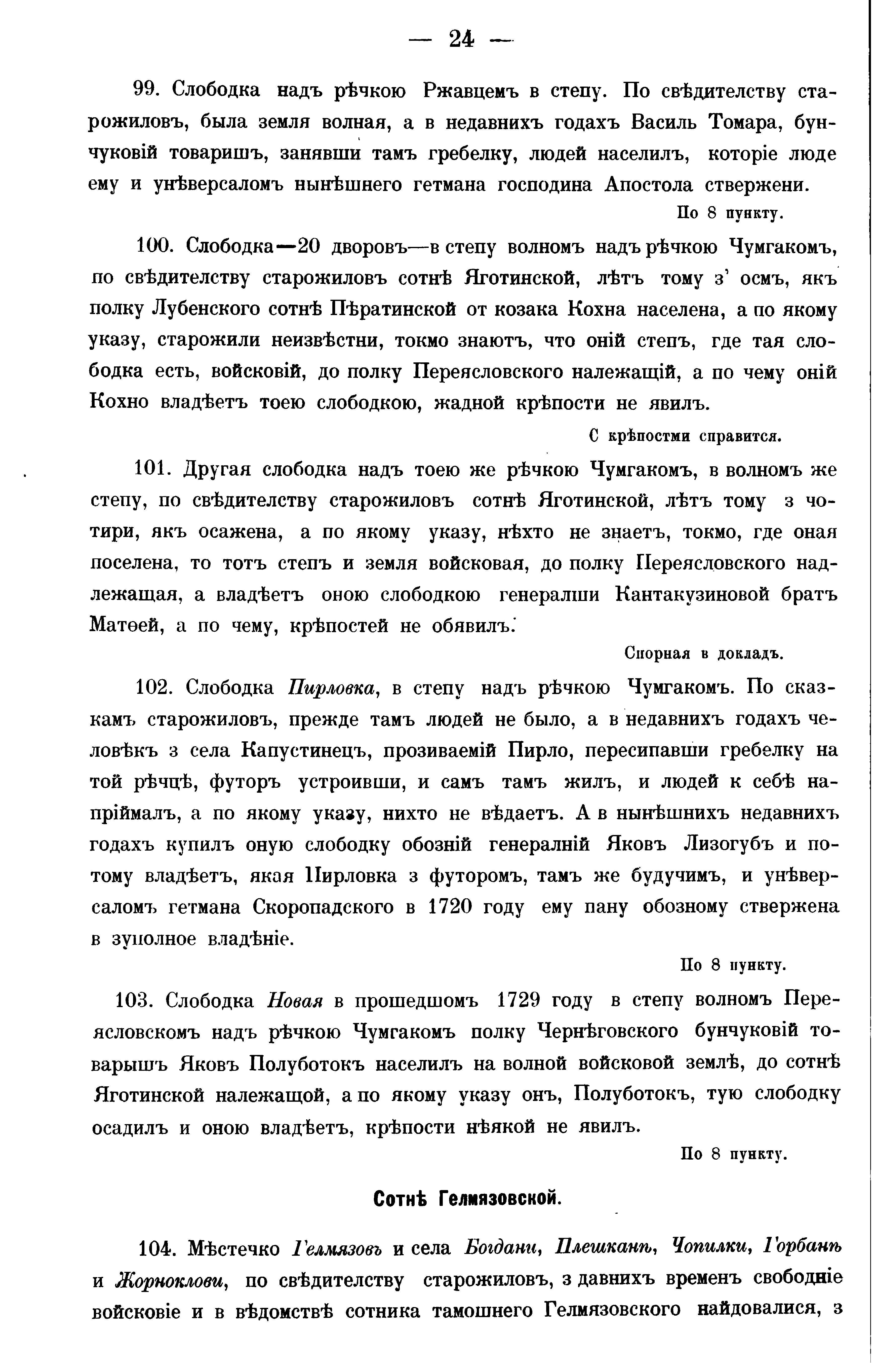 В.Мякотина 1896 “Генеральное следствие о маетностях Переясловского полка 1729-1731г.”